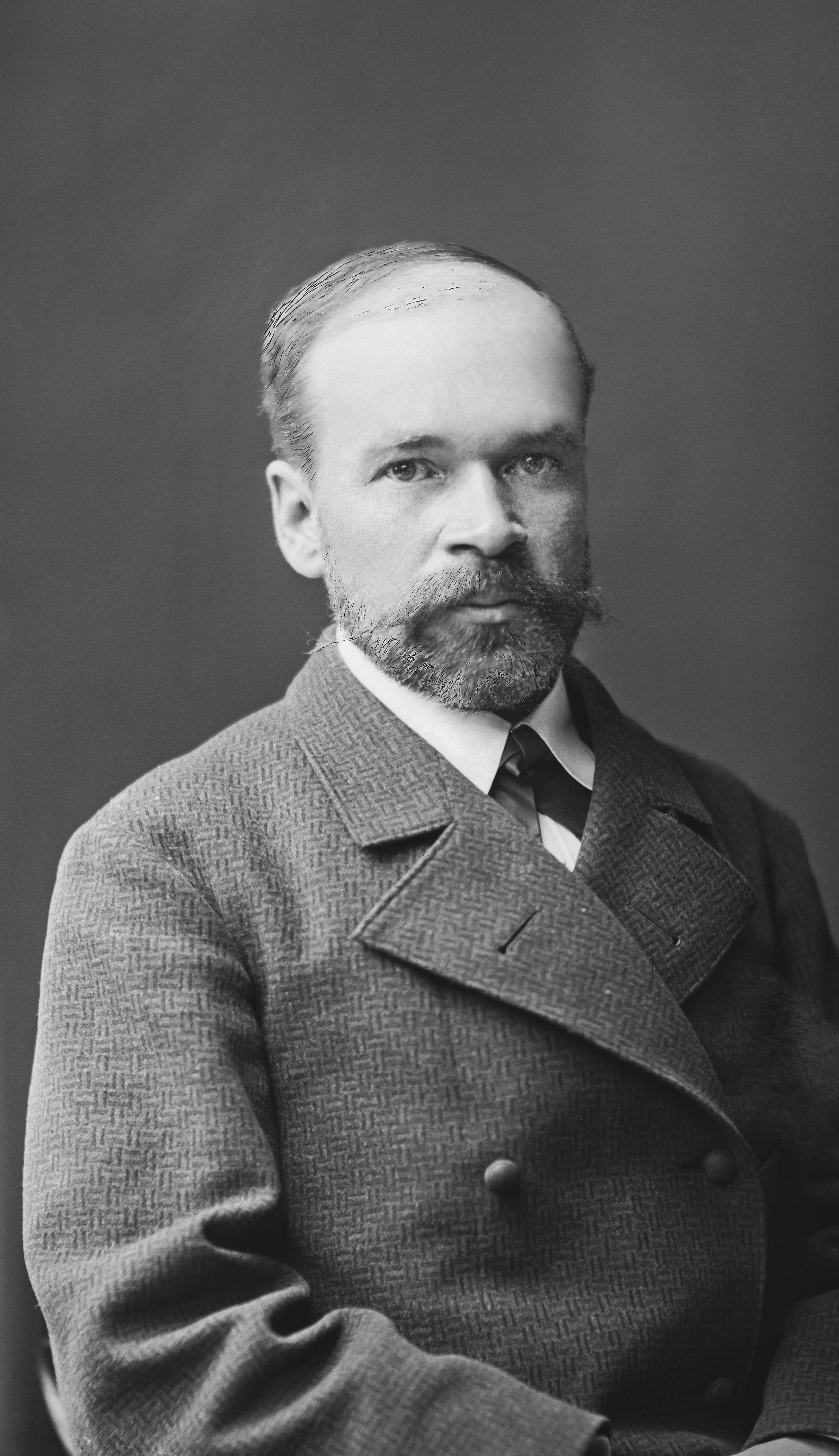 Maarianhaminan postinhoitaja Uno Godenhjelm, tuleva kamarikirjuri ja toimittaja